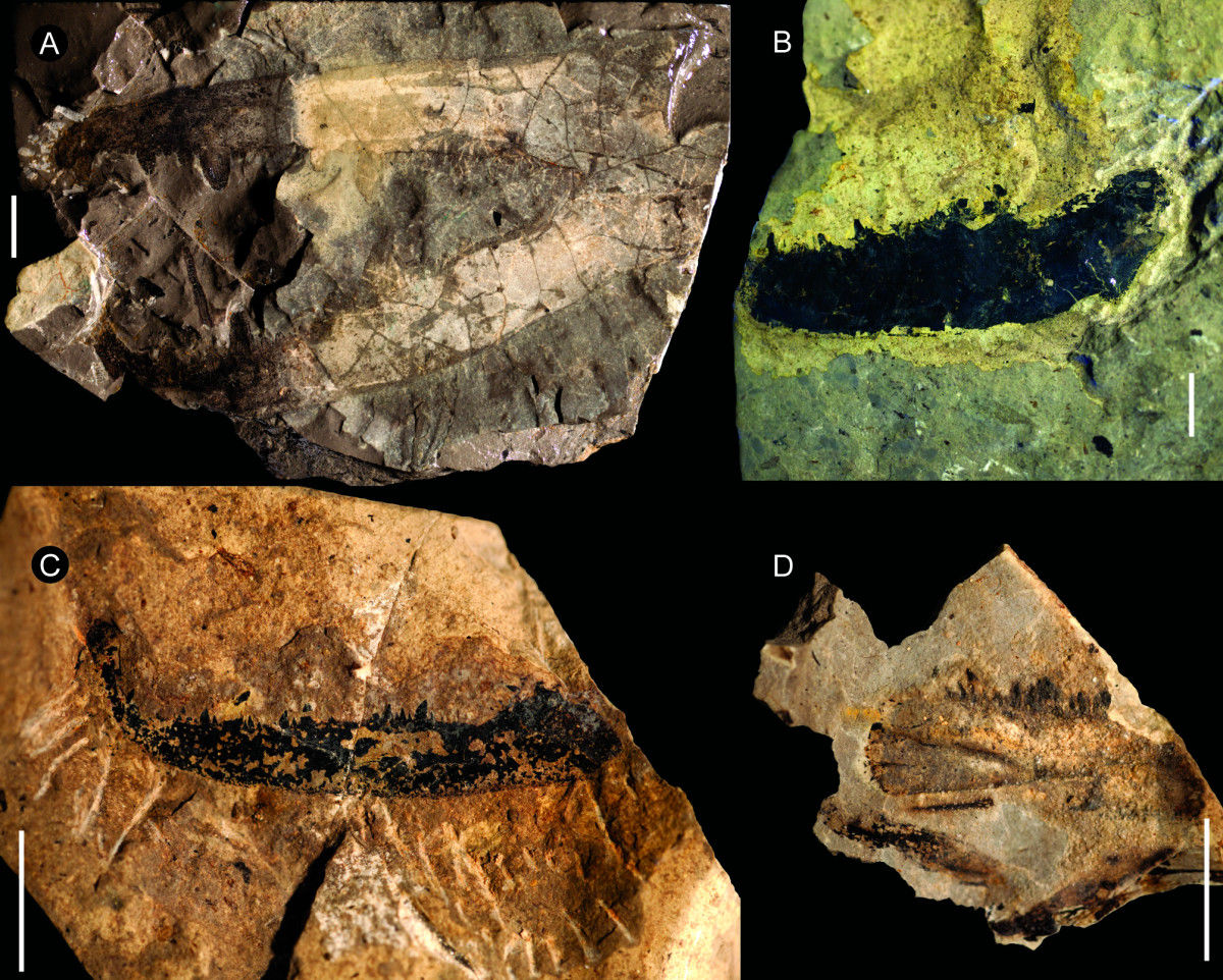 Jaekelopterus howelli. Chelicera specimens. A: FMNH PE 9436. B: KUMIP 292563. C: FMNH PE 26078. D: FMNH PE 61161. Scale bars = 10 mm.